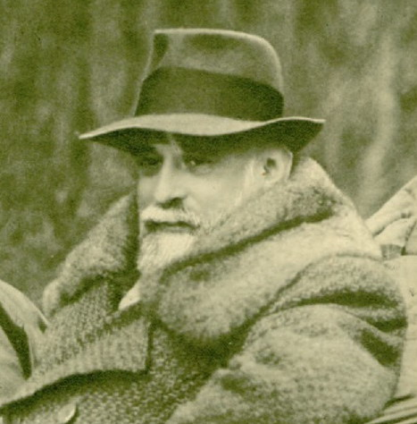 Constantin I.C. Brătianu la vânătoare